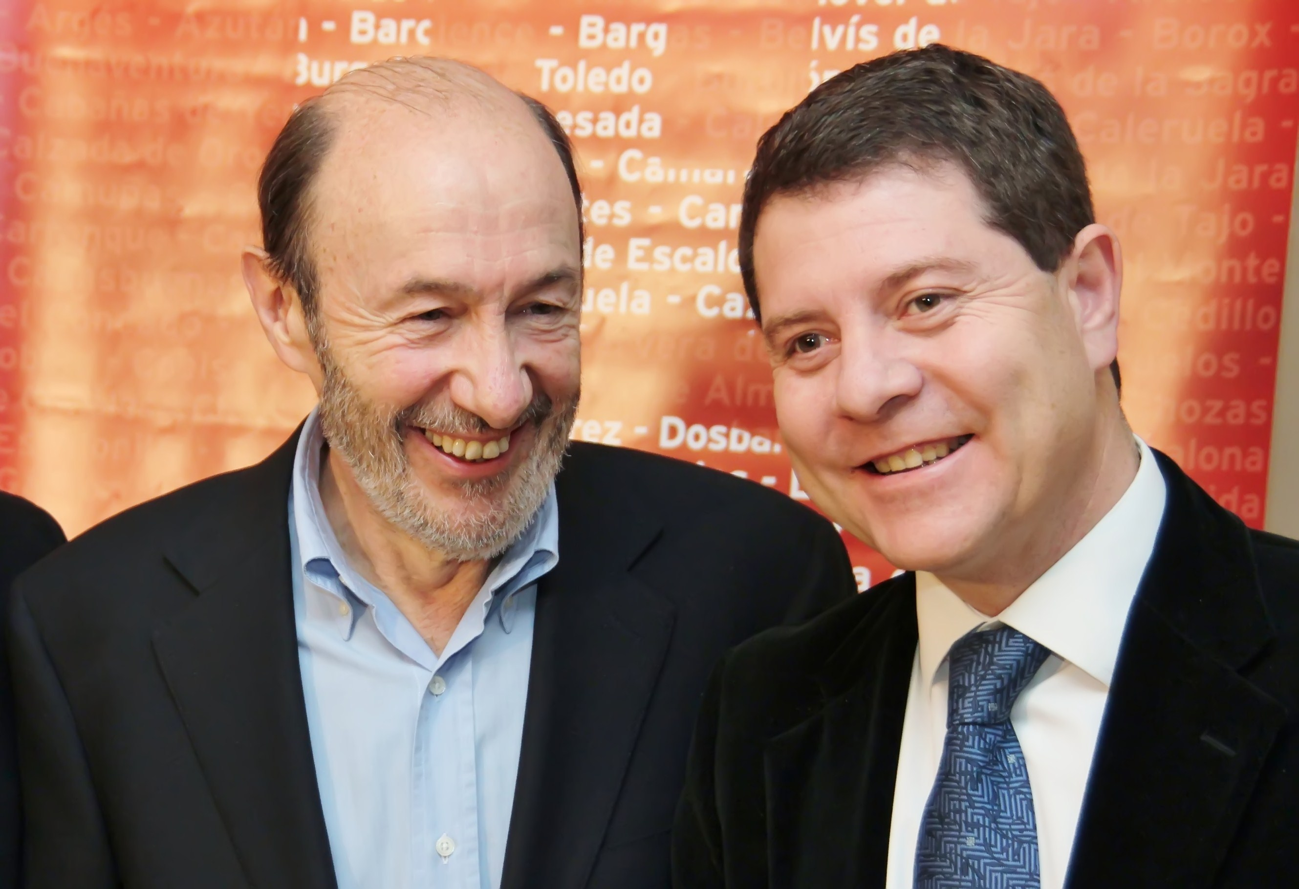 Emiliano García-Page y Alfredo Pérez Rubalcaba en Toledo